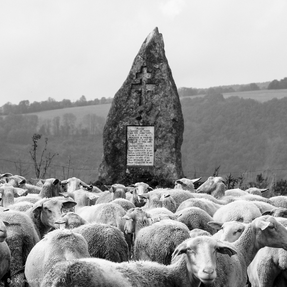 Stèle commémorative de l'attaque par l'armée allemande, le 8 août 1944, du terrain de parachutage des Maquis de Vabre, Virgule, et des maquis de Laroque et Lacado. Cette attaque occasionnera sept morts parmi les maquisards, énumérés sur cette stèle avec la mention : « Passant, Accorde une pensée aux sept combattants du C.F.L. 10 - Maquis de Vabre tombés ici le 8 août 1944 pour que tu vives libre. Lieutenant Gilbert BLOCH dit Patrick, 24 ans Roger GODCHAUX, 21 ans Idelfino CAVALIERO, 24 ans Rodolphe HORWITZ, 18 ans Gabriel SICARD, 23 ans Henri BERNARD, 21 ans Victor CELESTIN, 24 ans. ».